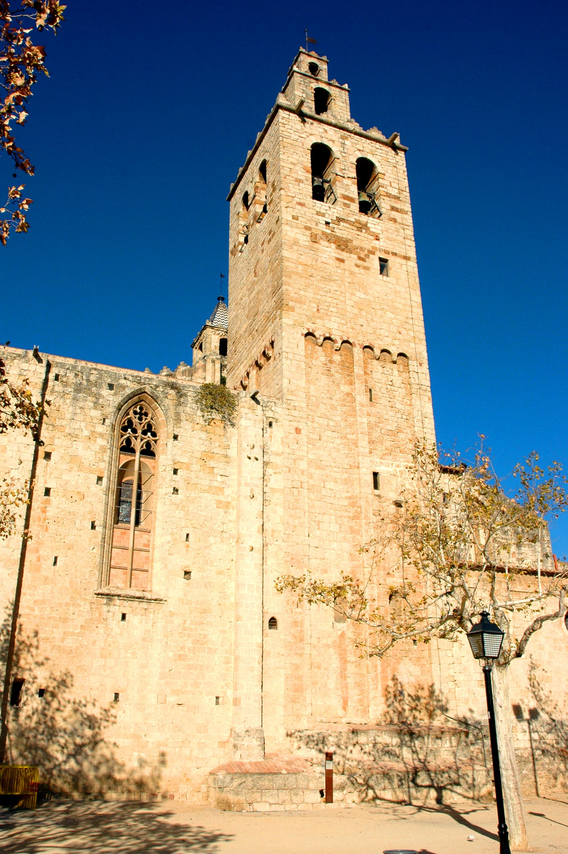 Monestir de Sant Cugat - Campanar